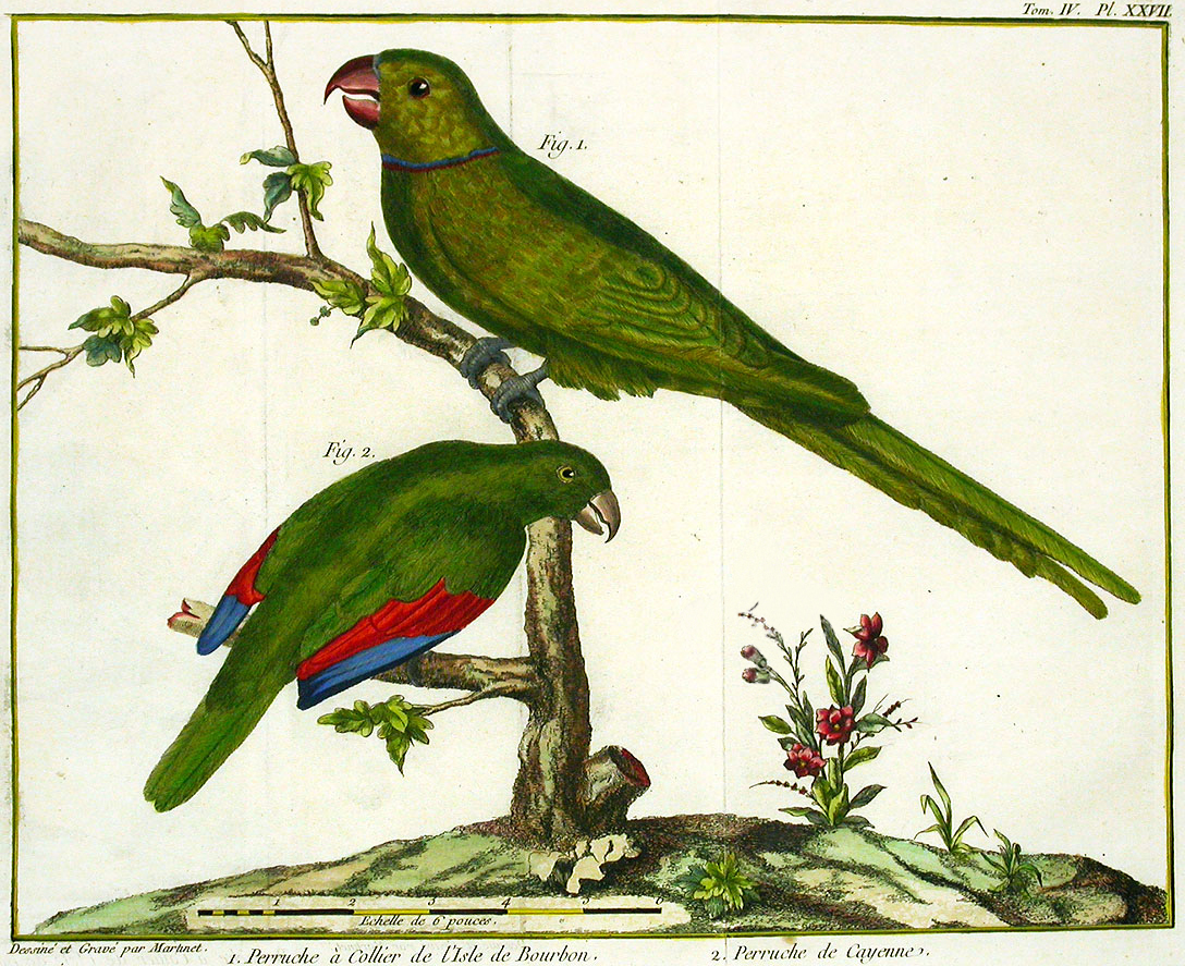 Perruche a Collier de l'Isle de Bourbon (Psittacula eques eques), Perruche de Cayenne. From Mathurin Jacques Brisson's "Ornithologia," 1760. By François-Nicolas Martinet (1731-1800).